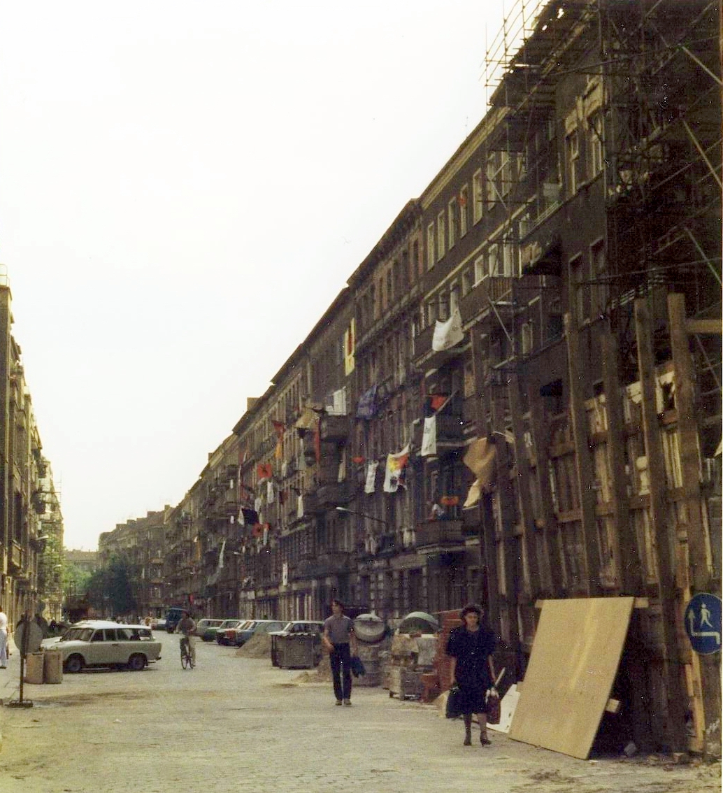 Ost-Berlin, Besetzte Häuser, Mainzer Straße, das Foto habe ich im Juni 1990 gemacht